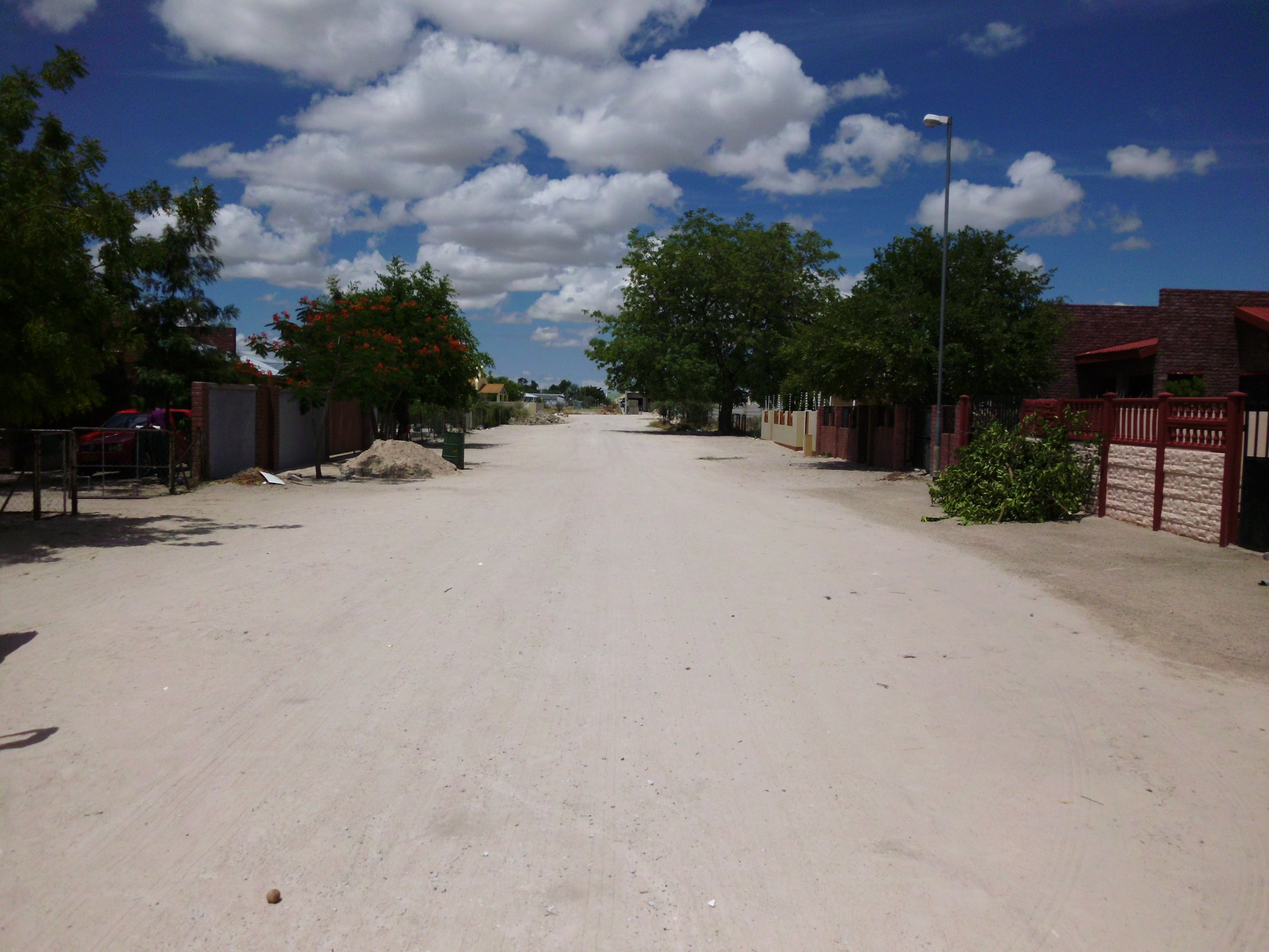 Wohngegend in Ongwediva.